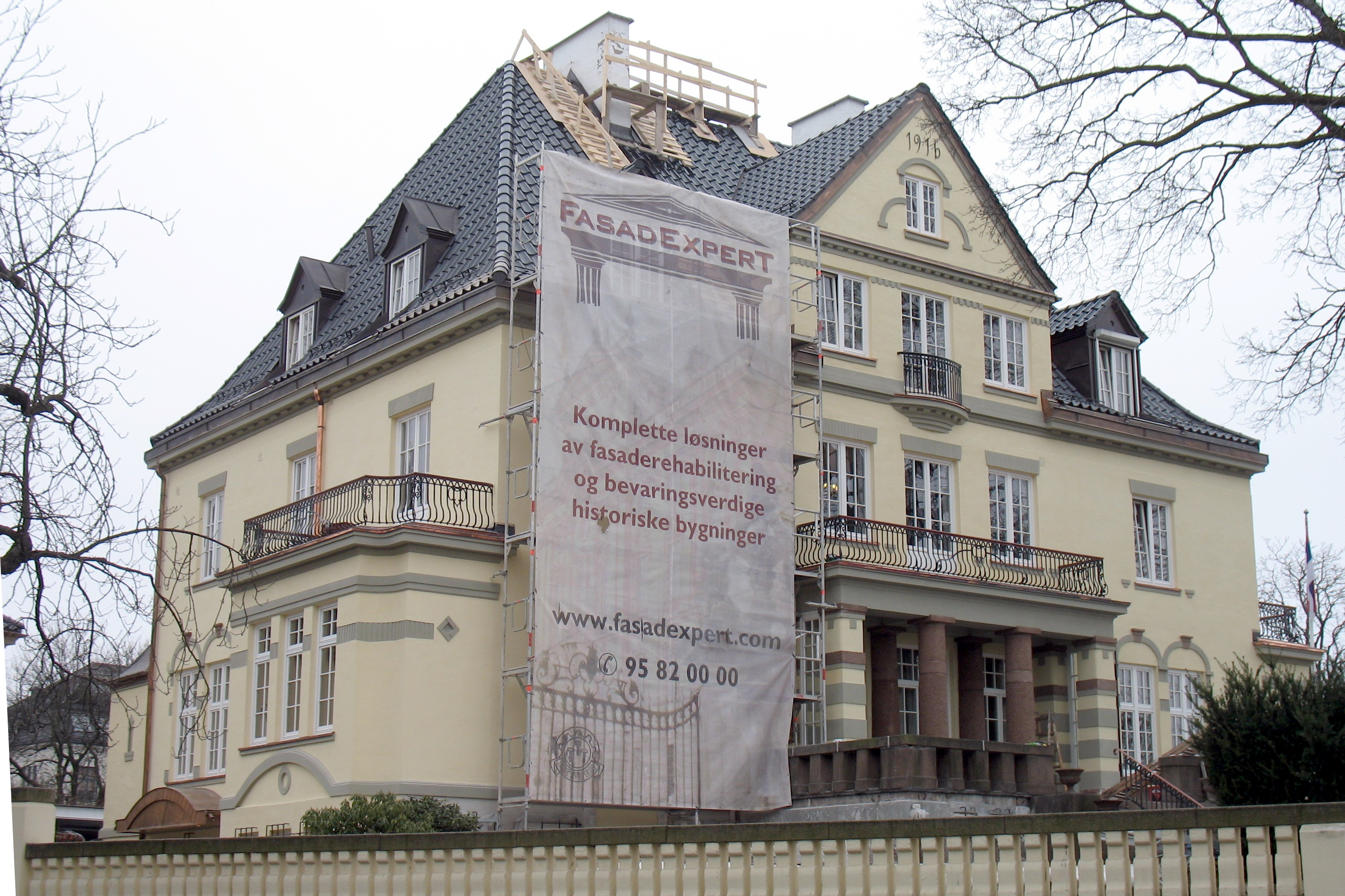 Polens ambassade i Oslo. bygningen har adresse Olav Kyrres plass 1, og ble oppført 1917 av arkitekt Herman Major Backer.